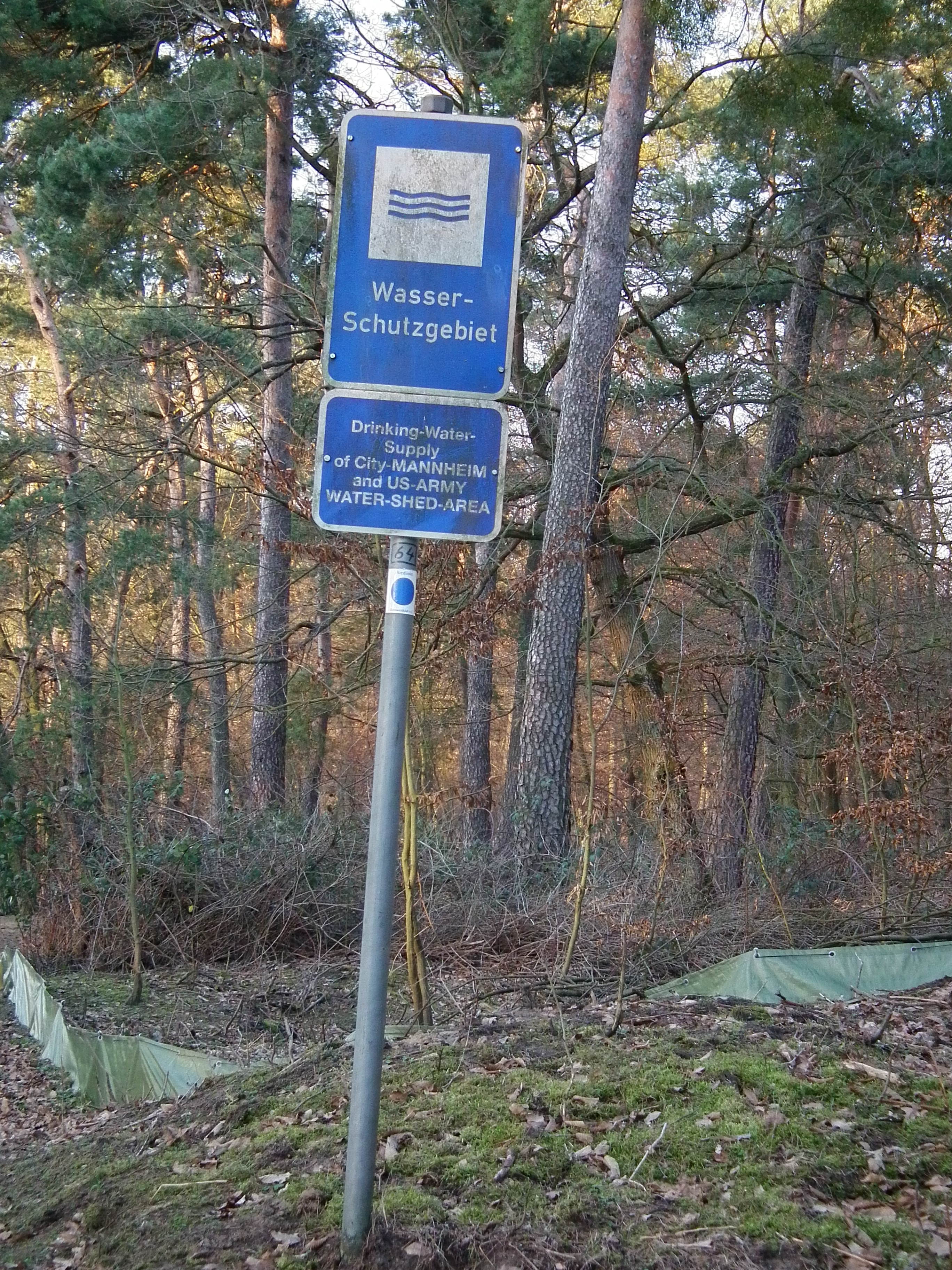 Blaues Hinweisschild auf das Wasserschutzgebiet im Unteren Dossenwald in Mannheim (Baden-Württemberg, Deutschland)